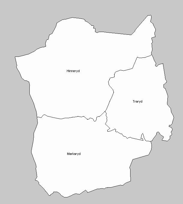 Socken in Markaryd